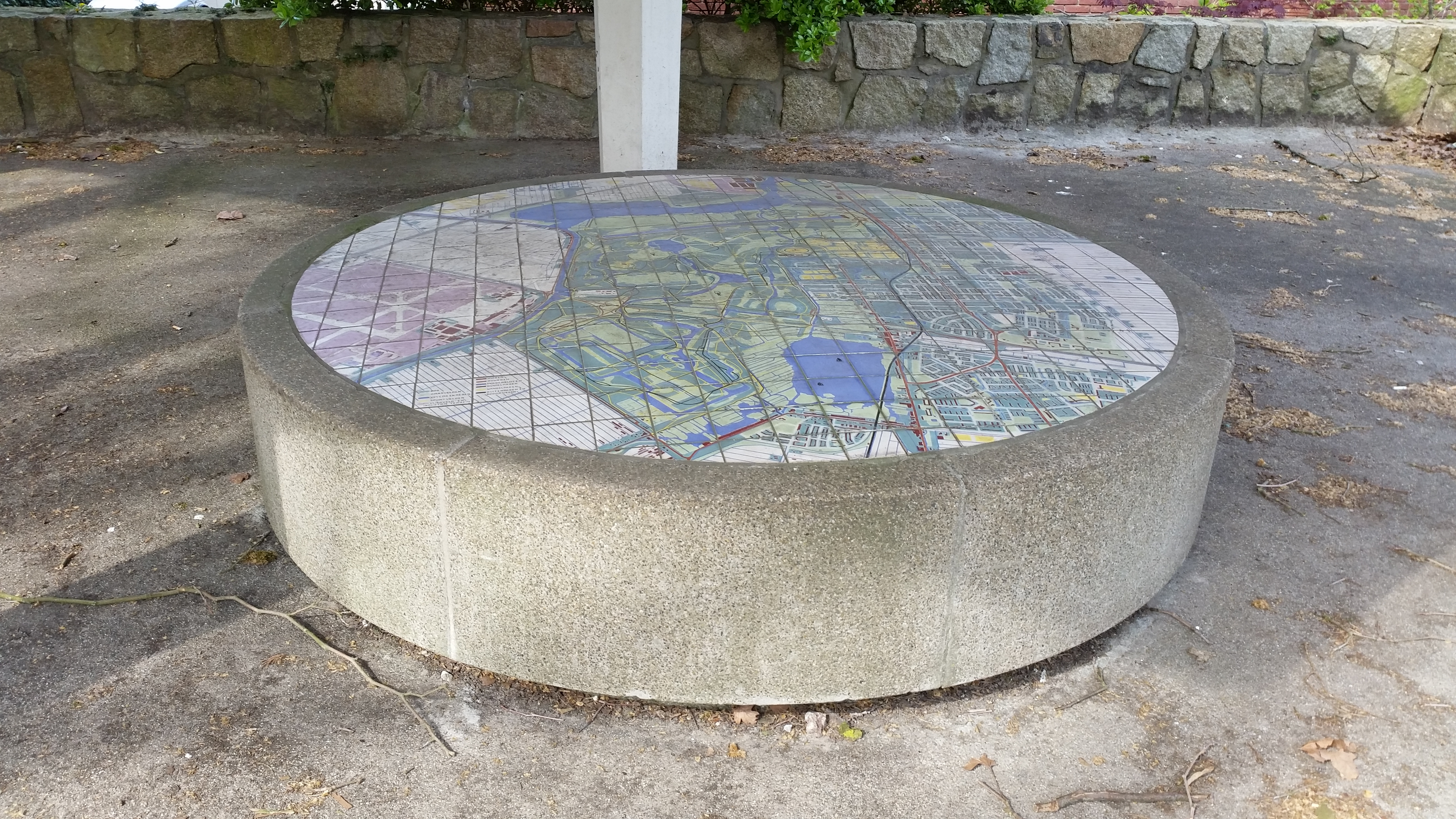 Kaart Amsterdamse Bos Kaartplateaus Amsterdamse Bos